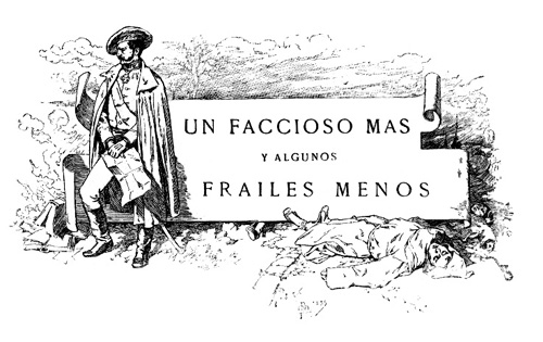 Ilustraciones de "Un faccioso más y algunos frailes menos" de Benito Pérez Galdós. Ilustradores: Mélida, Ferrant, Beruete, Ferriz, Gómez Soler, Alcázar, Hernández Nájera y Mestres. Madrid, Administración de La Guirnalda y Episodios Nacionales, 1884, pp. 239-456.